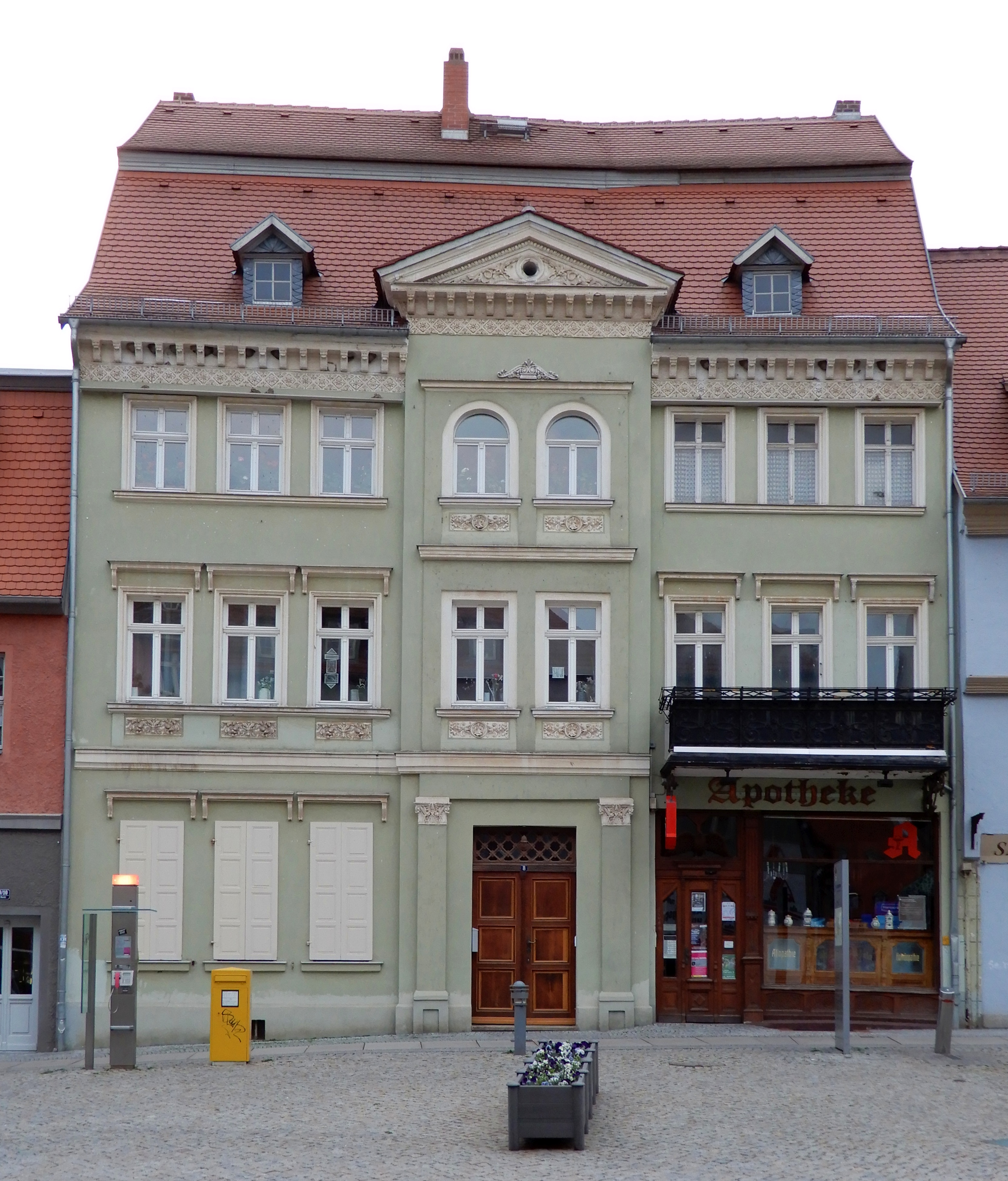 Gebäude Markt 8 in Aschersleben